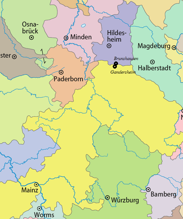 Bistum Hildesheim (violett) und Erzbistum Mainz (gelb), kirchliche Jurisdiktionsbereiche von der Gründung bis zur Neuumschreibung 1821/1824 (nicht zu verwechseln mit den HRR-Territorien Kurmainz und Hochstift Hildesheim) mit Eintragung von Brunshausen und Gandersheim